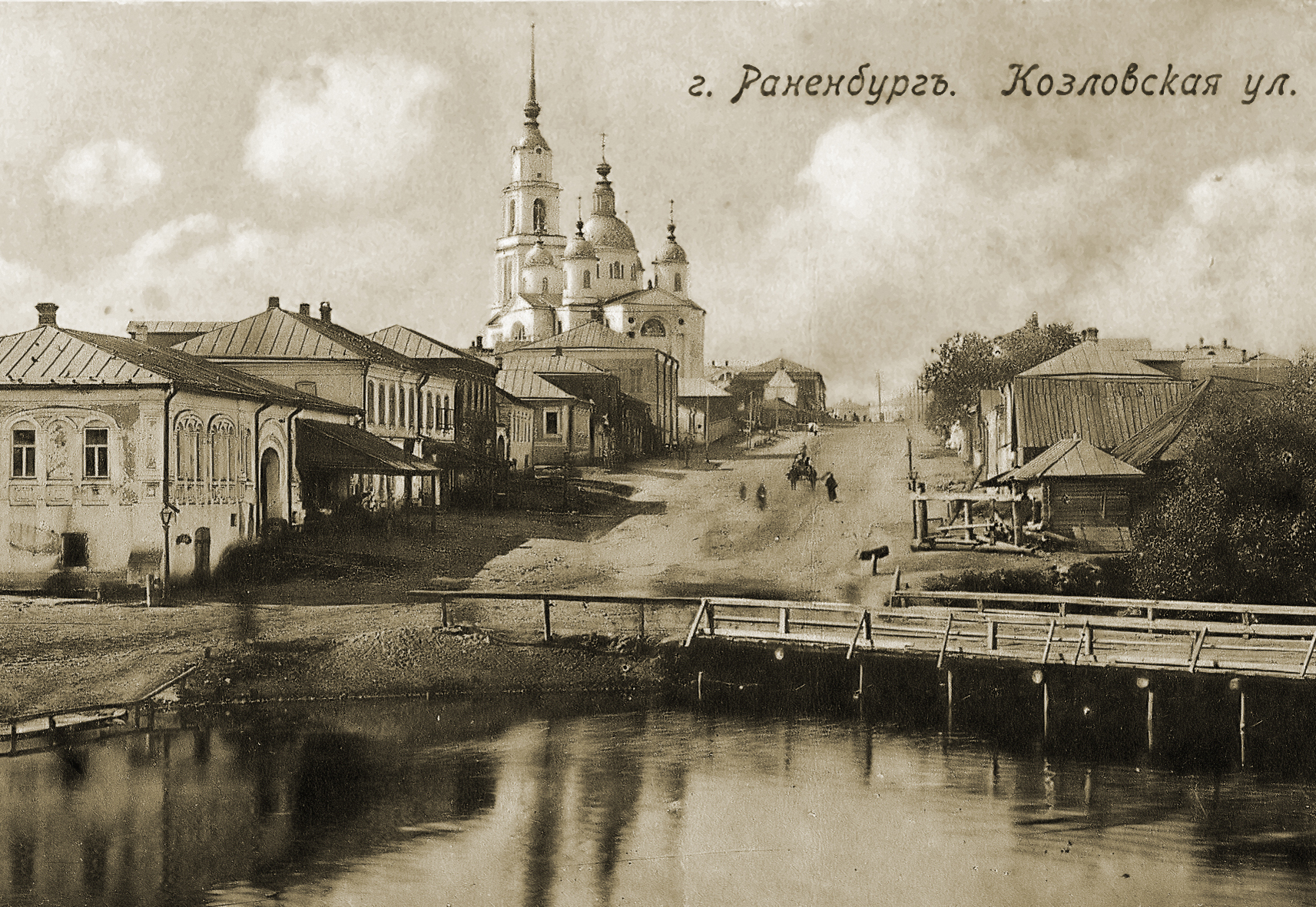 Раненбург. Козловская улица.